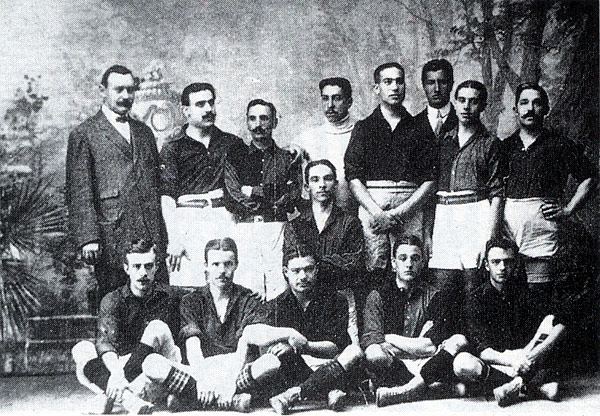 A FC Barcelona squad, champion.